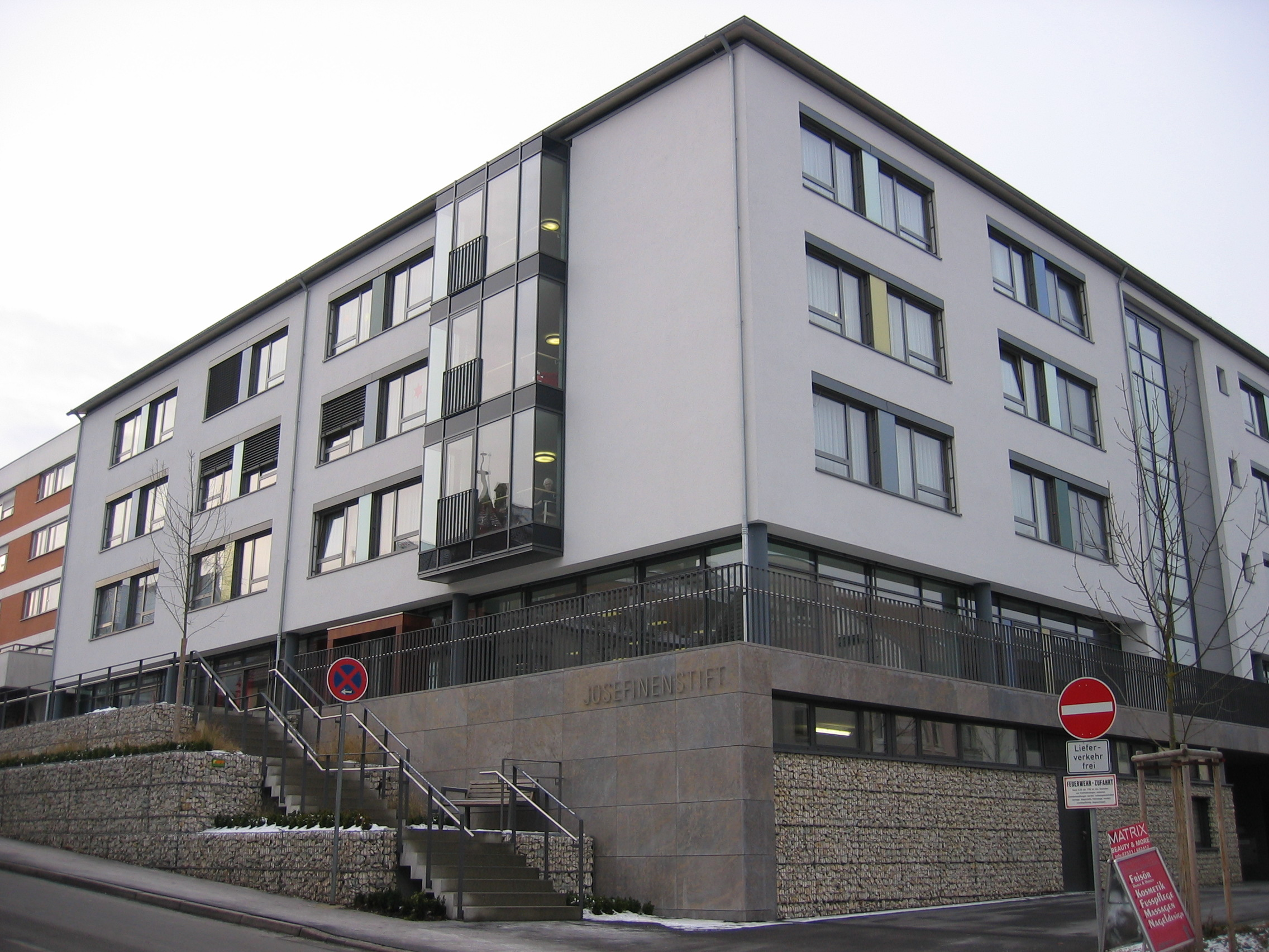 Josefinenstift in Sigmaringen (Matthäus-Hanh-Straße) der Genossenschaft der Barmherzigen Schwestern vom hl. Vinzenz von Paul in Untermarchtal e.V. des Ordens der Barmherzigen Schwestern vom hl. Vinzenz von Paul